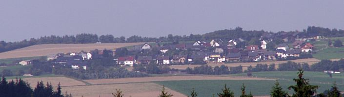 Rodder/Eifel, Germany